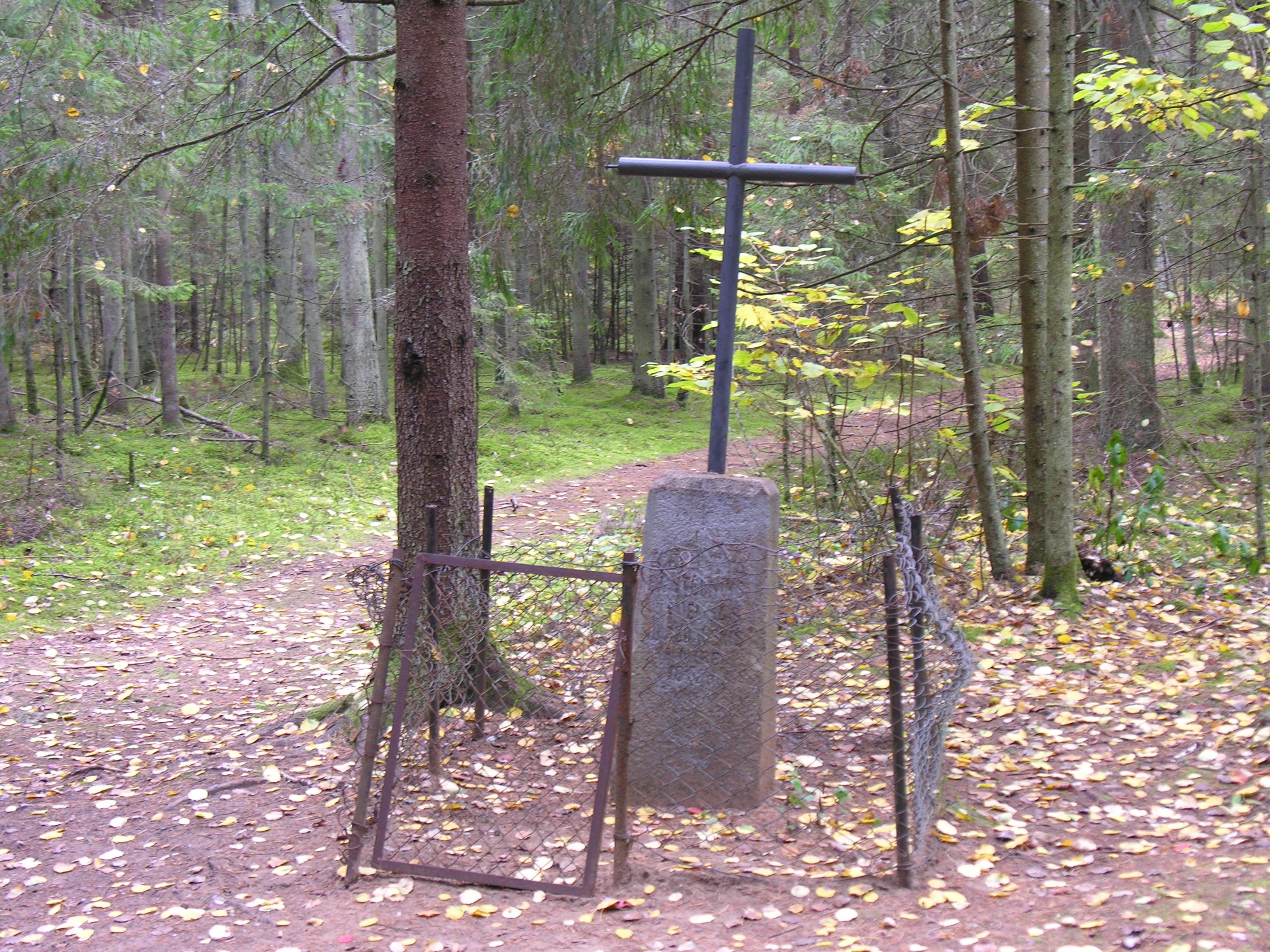 Atsiskyrėlio Drazdausko kapas Tirkšlių pušyne, Mažeikių raj. Foto: Algirdas, 2005 m. spalio 21 d.